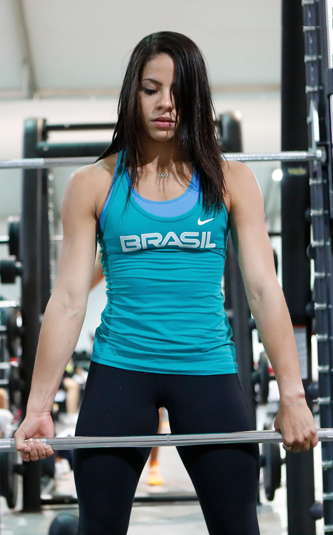 Rio de Janeiro - Atleta Ingrid Oliveira, dos saltos ornamentais, treina na academia da Vila Olmpica dos Jogos Rio 2016. (Fernando Frazão/Agência Brasil)